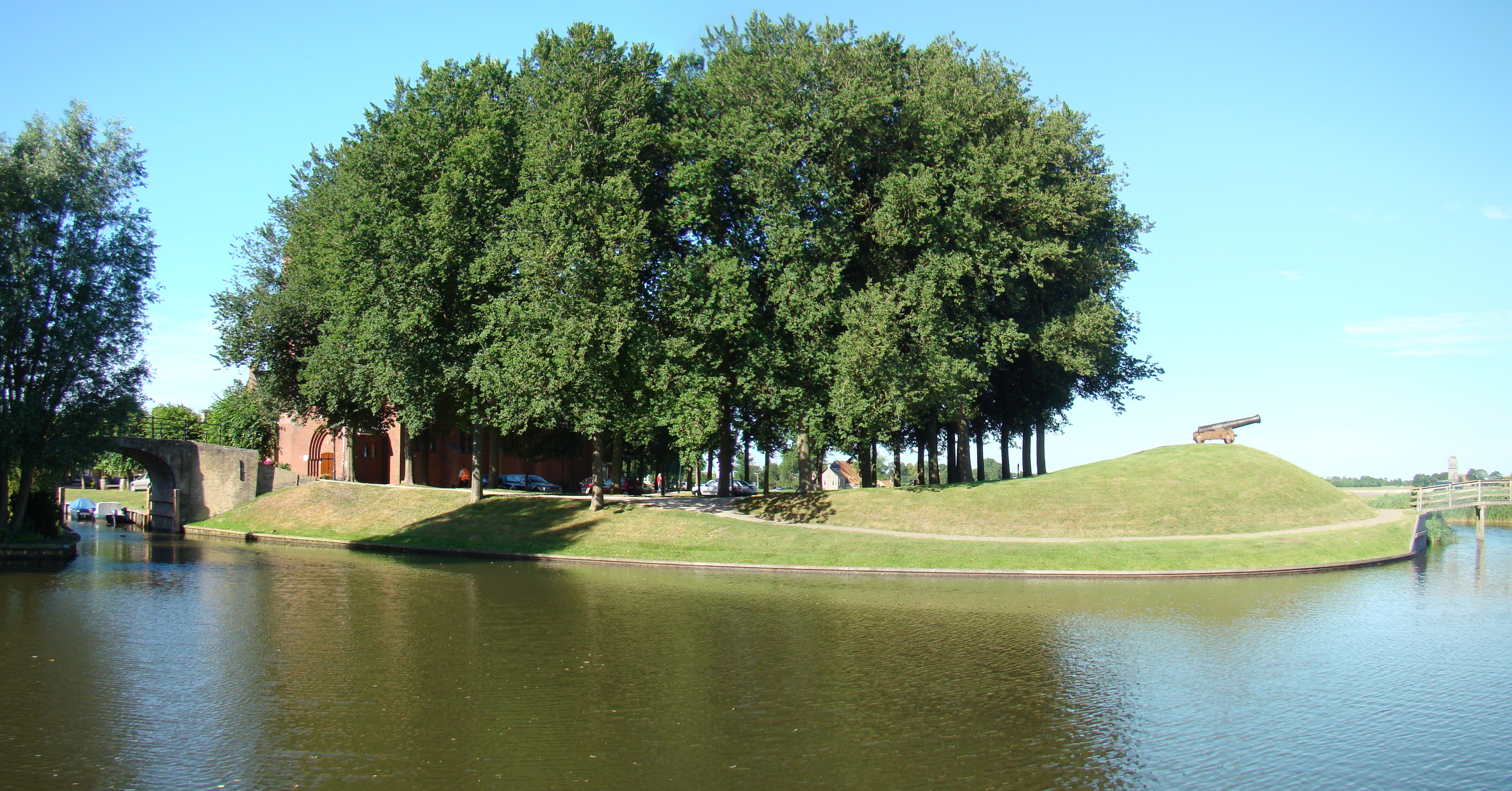 De Stadsschans in Sloten, Friesland, met links de Woudsenderwaterpoort